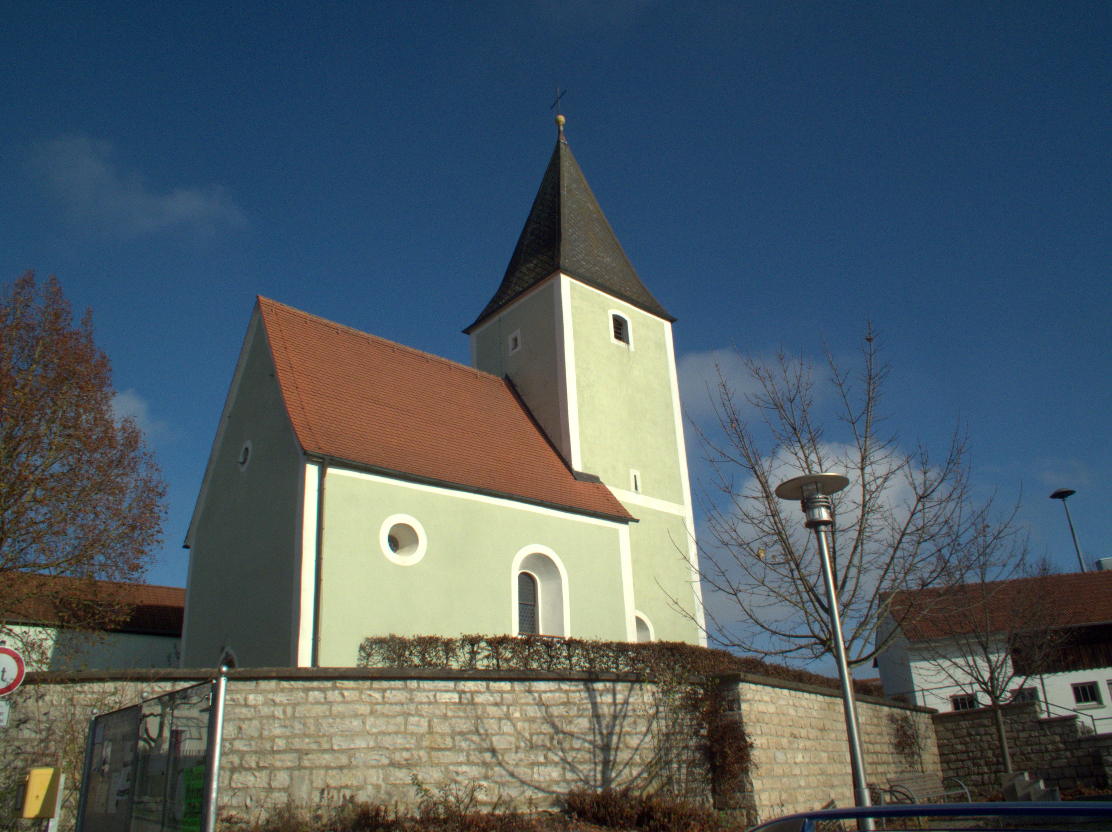 Die katholische Filialkirche St. Maria in Unterbuchfeld bei Deining in der Oberpfalz